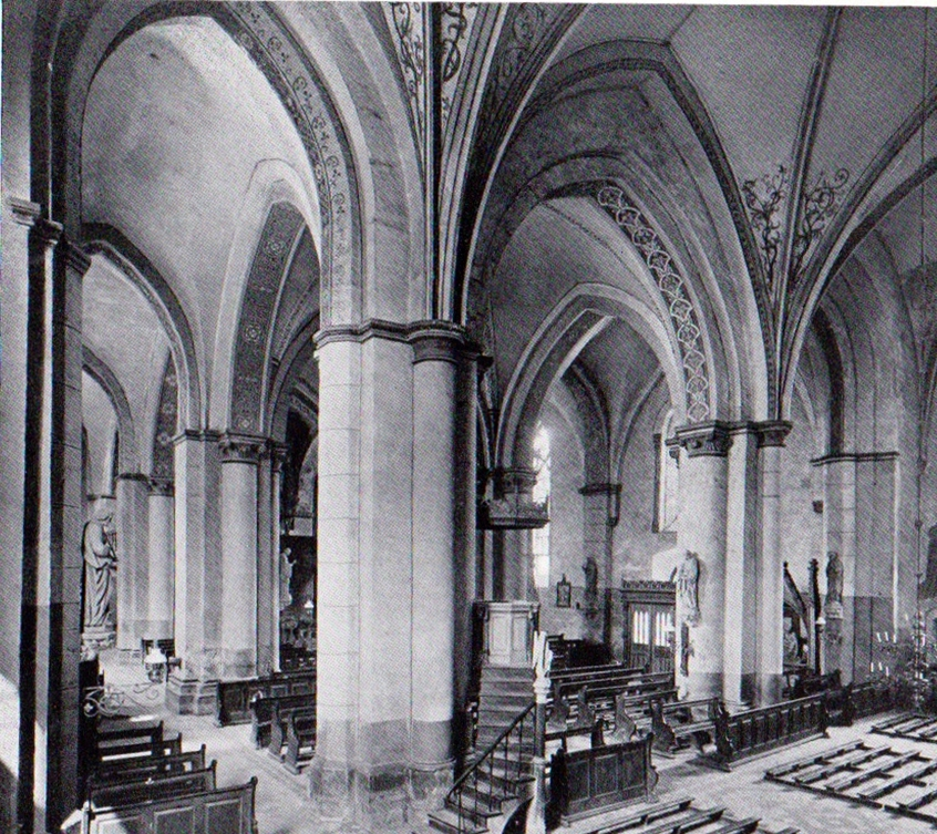 Brilon, St. Petrus und Andreas, Innenansicht von Südosten Zustand von 1900